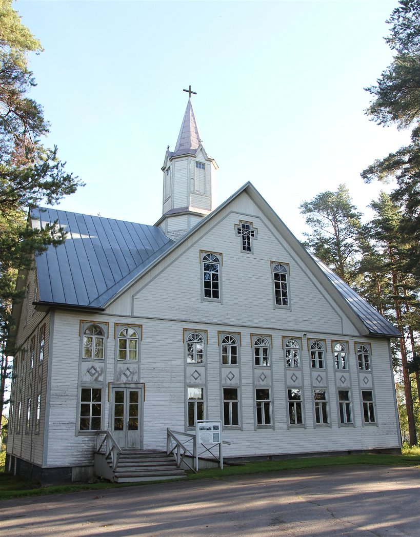 Otavan kyläkirkko on vuosina 1927-29 rakennettu kirkkorakennus Mikkelin Otavan taajamassa.